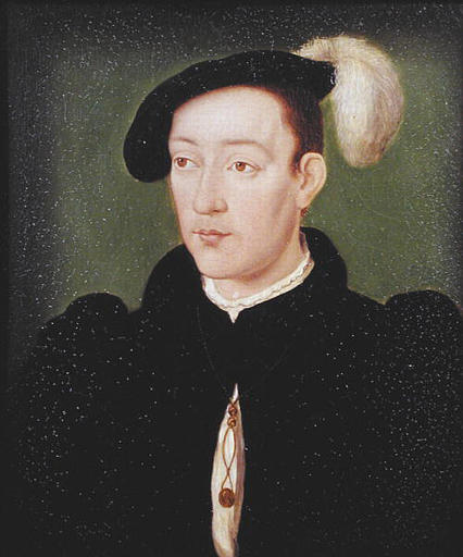 Portrait du Duc de Bretagne, François III, Dauphin de France